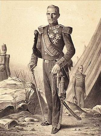 Retrato de José Carratala Martinez, militar español del siglo XIX